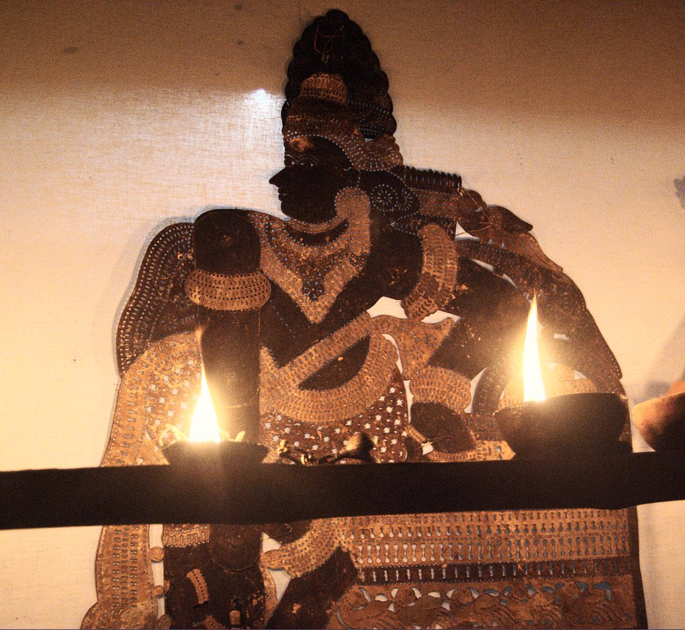 തോല്‌പ്പാവ തിരശ്ശീലയ്ക്കു പിന്നിൽ നിന്ന്